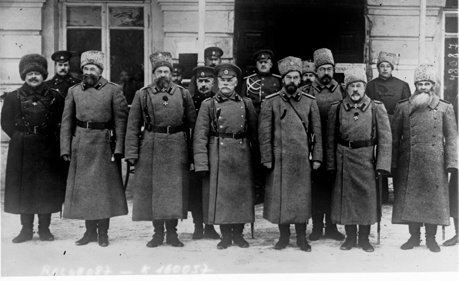 Император Николай II с участниками совещания в Ставке в конце февраля 1916 г